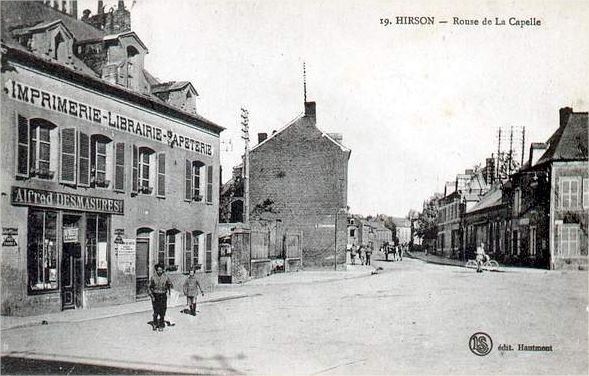 Imprimerie Alfred Desmasures Route de la Capelle à Hirson